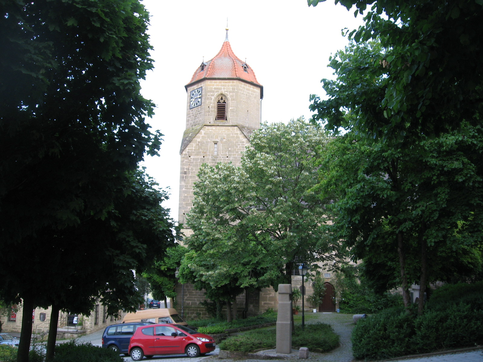 Blick im Sommer vom Eingang des Obersontheimer Schlosses auf die evangelische Pfarrkirche des Ortes, davor das Schubartdenkmal.